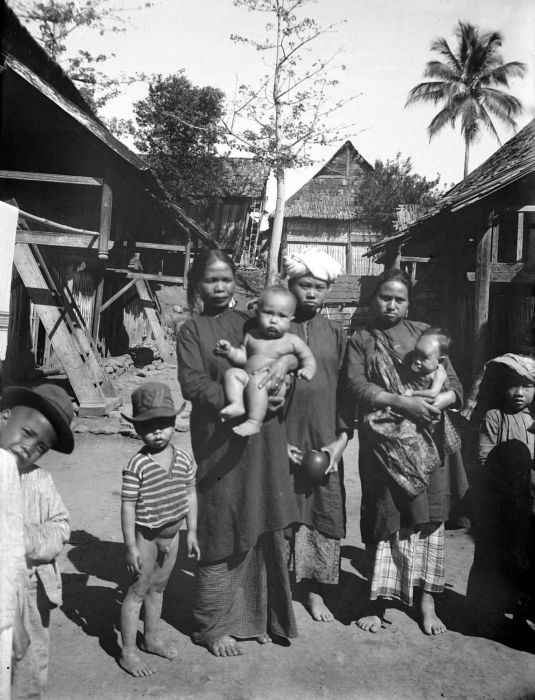 Negatief. Vrouwen en kinderen uit een Kerintisch dorp, West-Sumatra